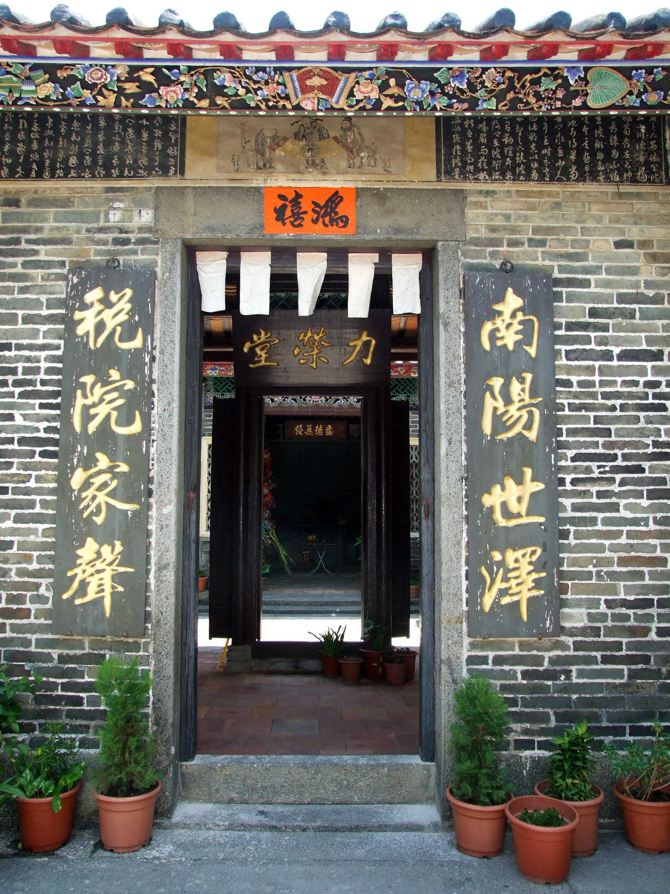 中文（香港）: 力榮堂書室